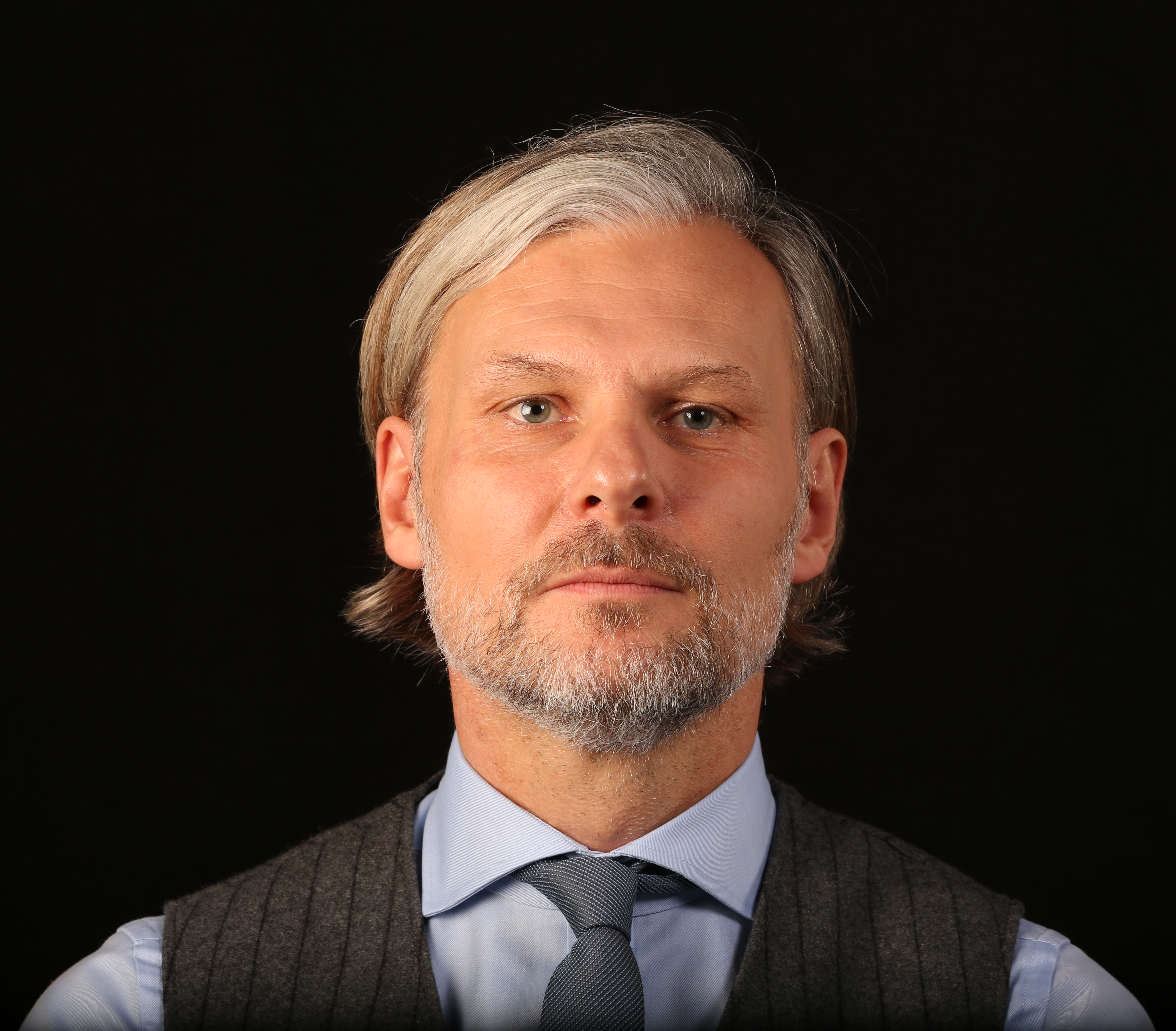 Helmut Jungwirth auf der Frankfurter Buchmesse 2017.